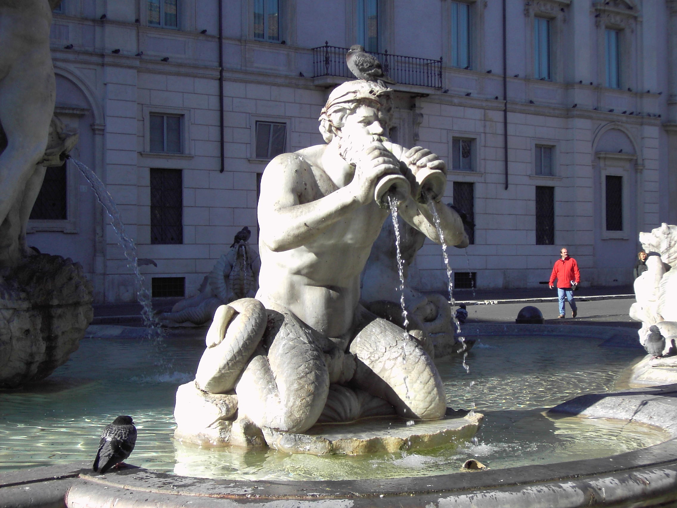 Roma, Piazza Navona, Fontana del Moro (Roma) (particolare) by Lalupa